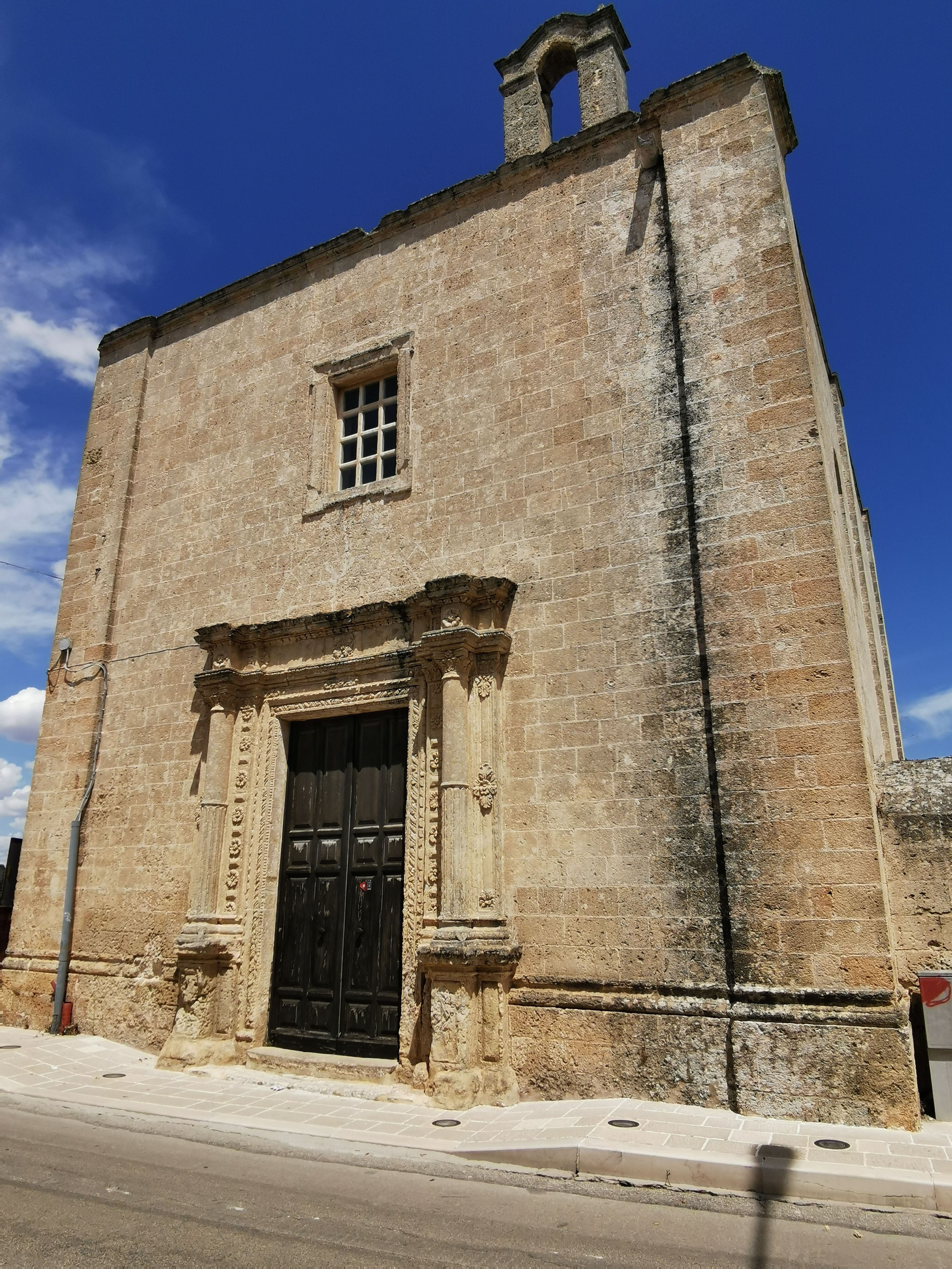 Ex chiesa di Santa Croce, a Manduria.